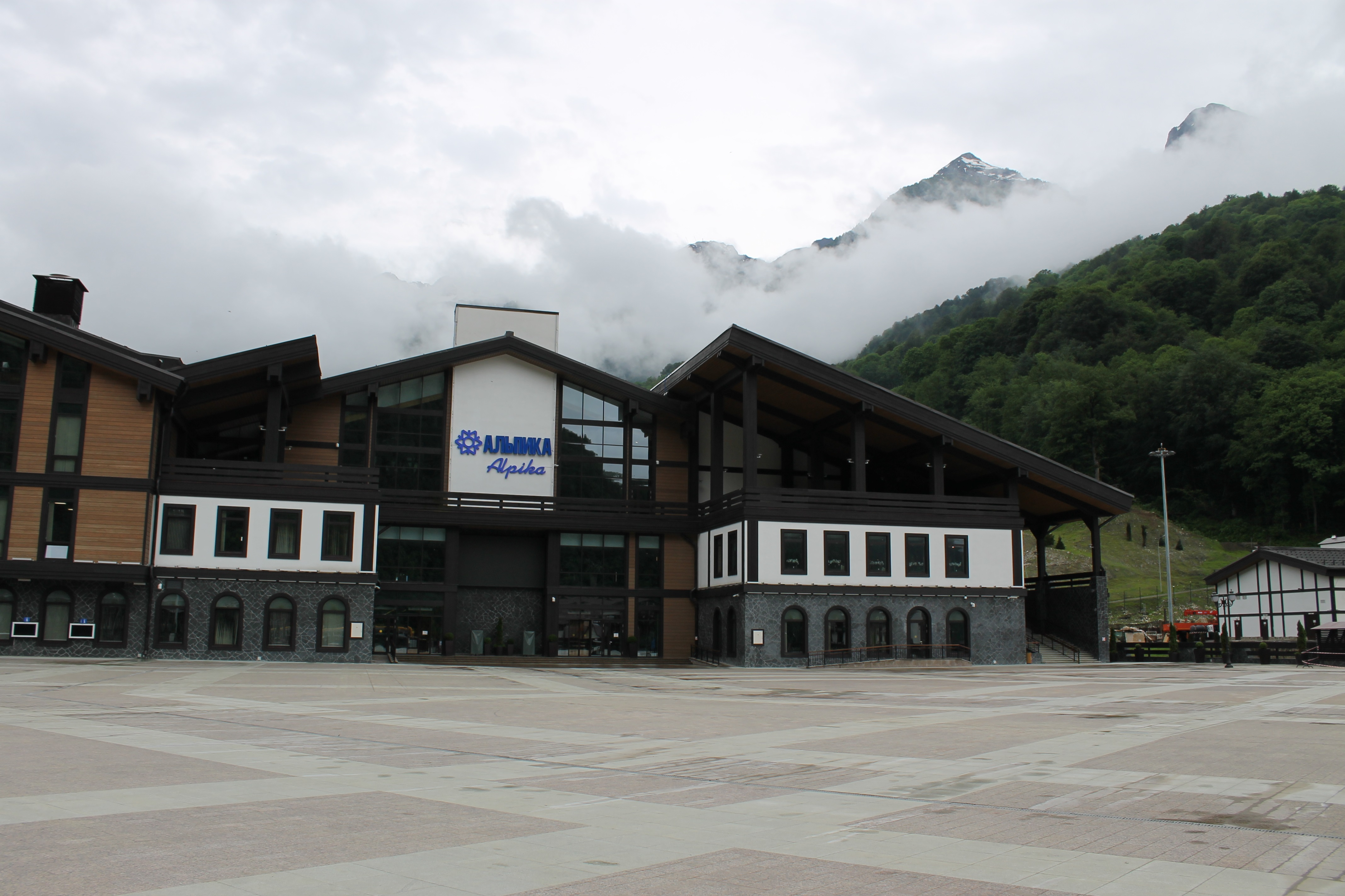 Новая нижняя станции канатной дороги Альпика Сервис. Построена на месте старой станции Альпика Сервис в 2013 году.